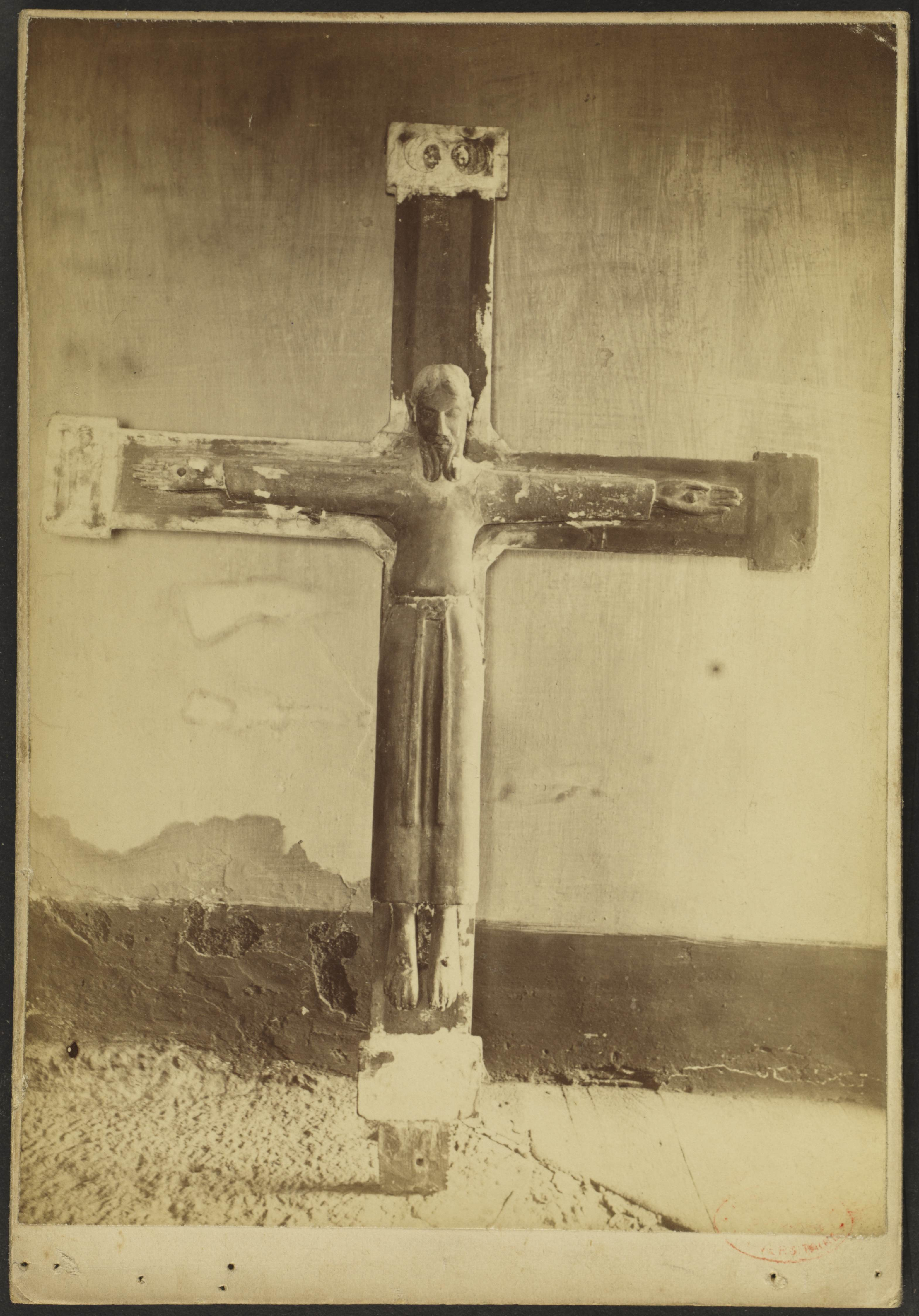 Eglise de La Llagonne; Croix